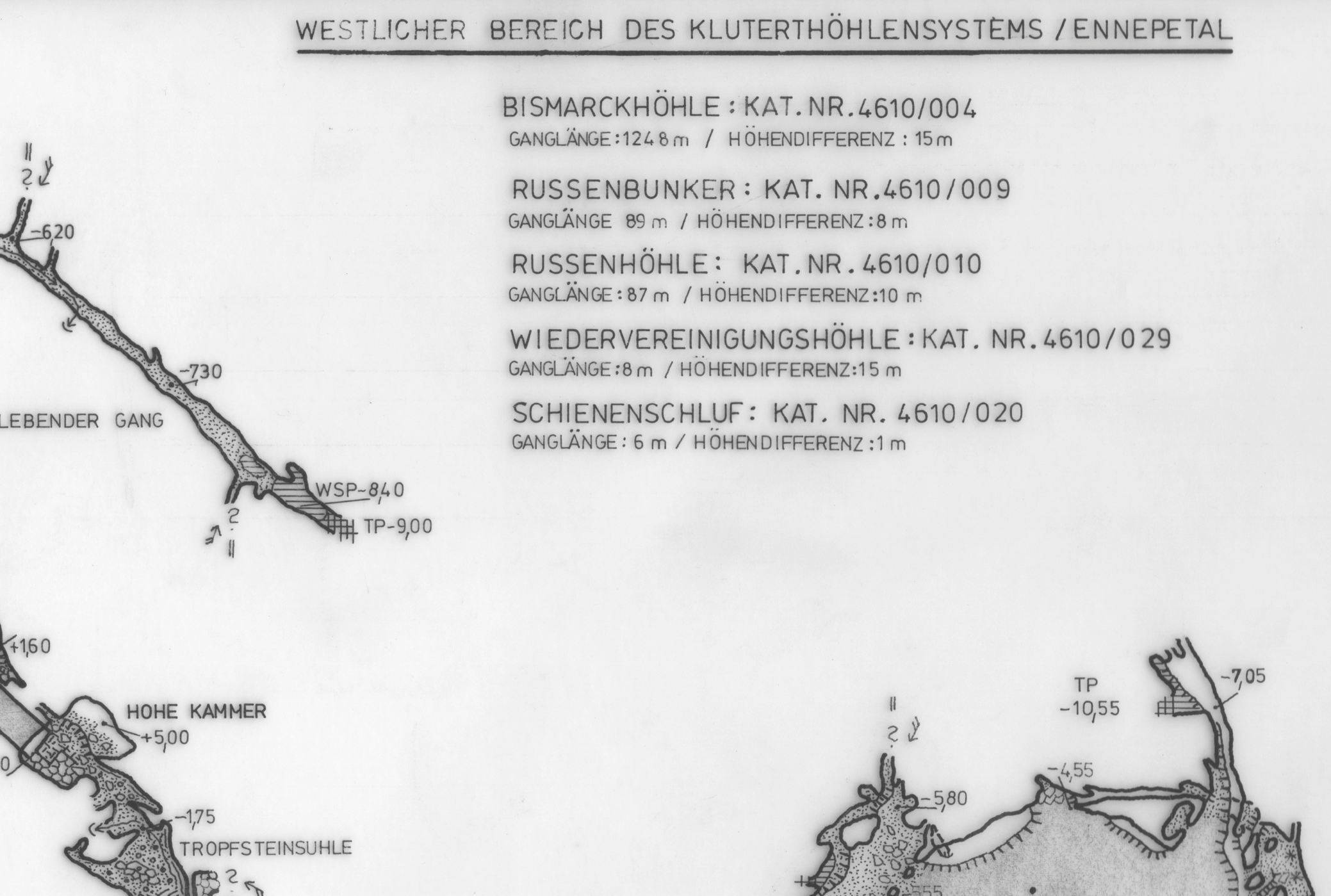 Ausschnitt aus einem Höhlenplan des Arbeitskreises Kluterthöhle, der 5 Höhlen im Klutertberg umfasst und deren Daten auflistet.